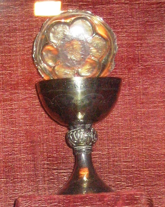 Cáliz y Patena de la iglesia del Cebreiro (Galicia). Símbolo de Galicia.